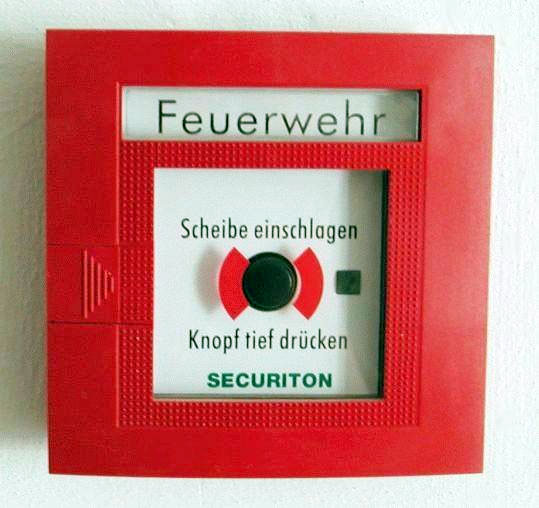 Bild eines Feuermelders